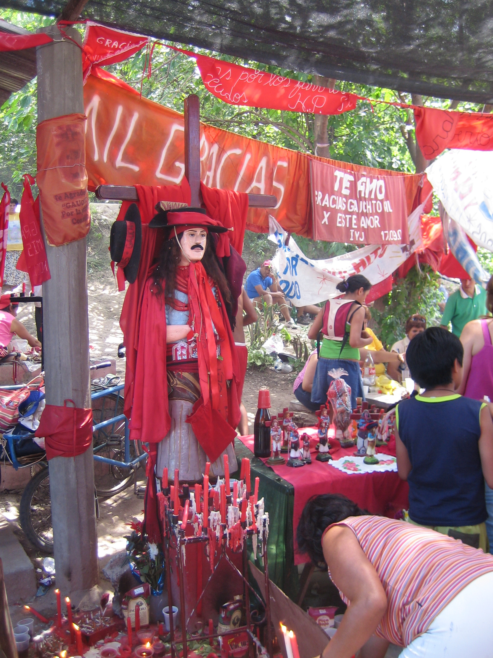 Gvh Gauchito Gil est un "saint" consacré par la ferveur populaire des populations indiennes d'Argentine. Sa célébration en 2004 a pris l'allure d'un véritable événement en 2004.